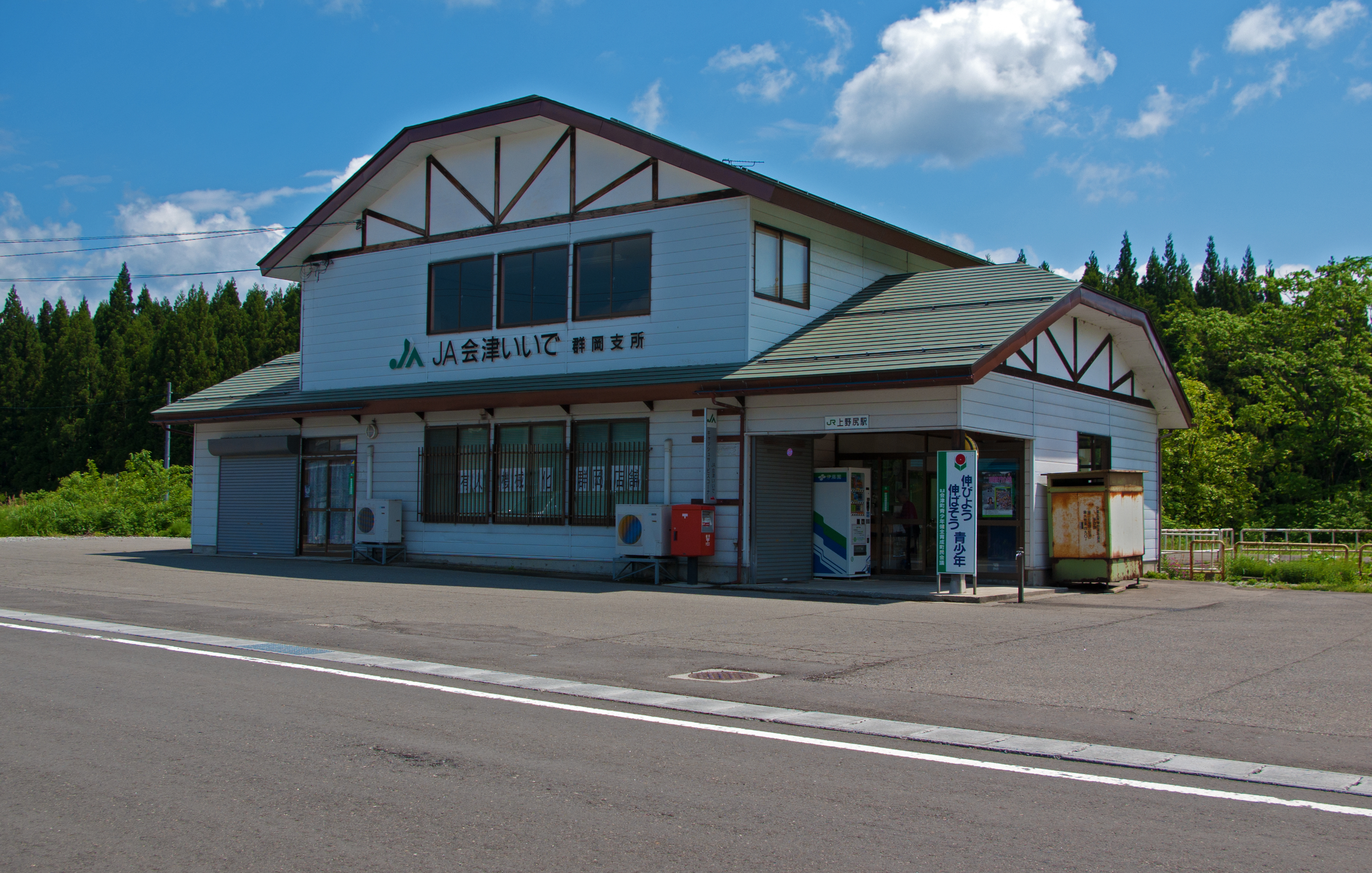 東日本旅客鉄道株式会社磐越西線上野尻駅